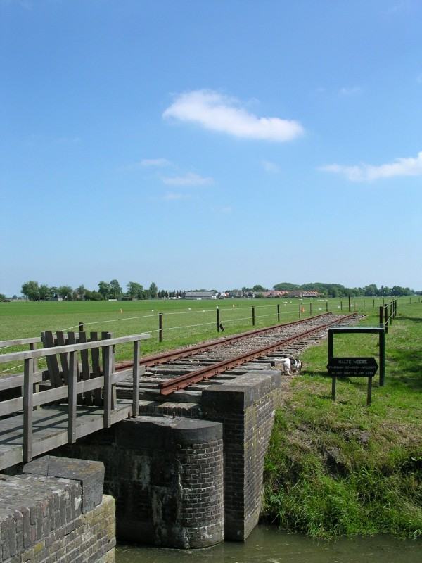 De overblijfselen van de trambaan Schagen - Wognum (1898-1930) in De Weere, nu een monument. Remains of the tramrail Schagen - Wognum (1898-1930) in the hamlet of De Weere. Now a monument.